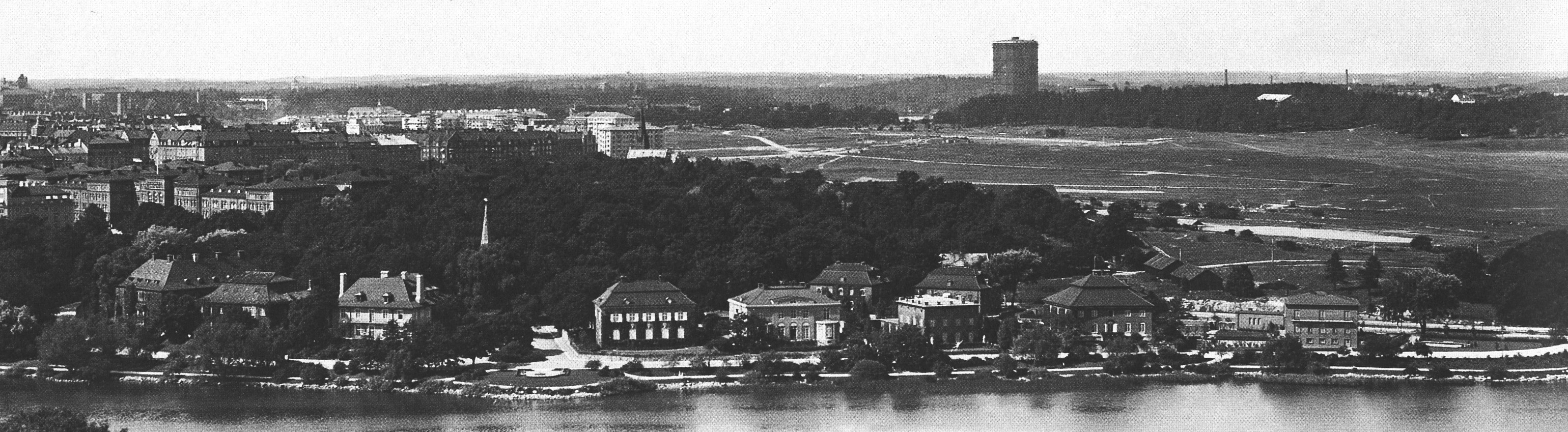 Vy från Bredablick på Skansen över Diplomatstaden i Stockholm